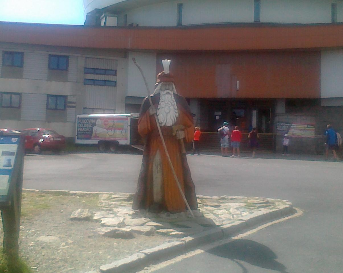 Figura Pradziada przy wieży na górze Pradziad